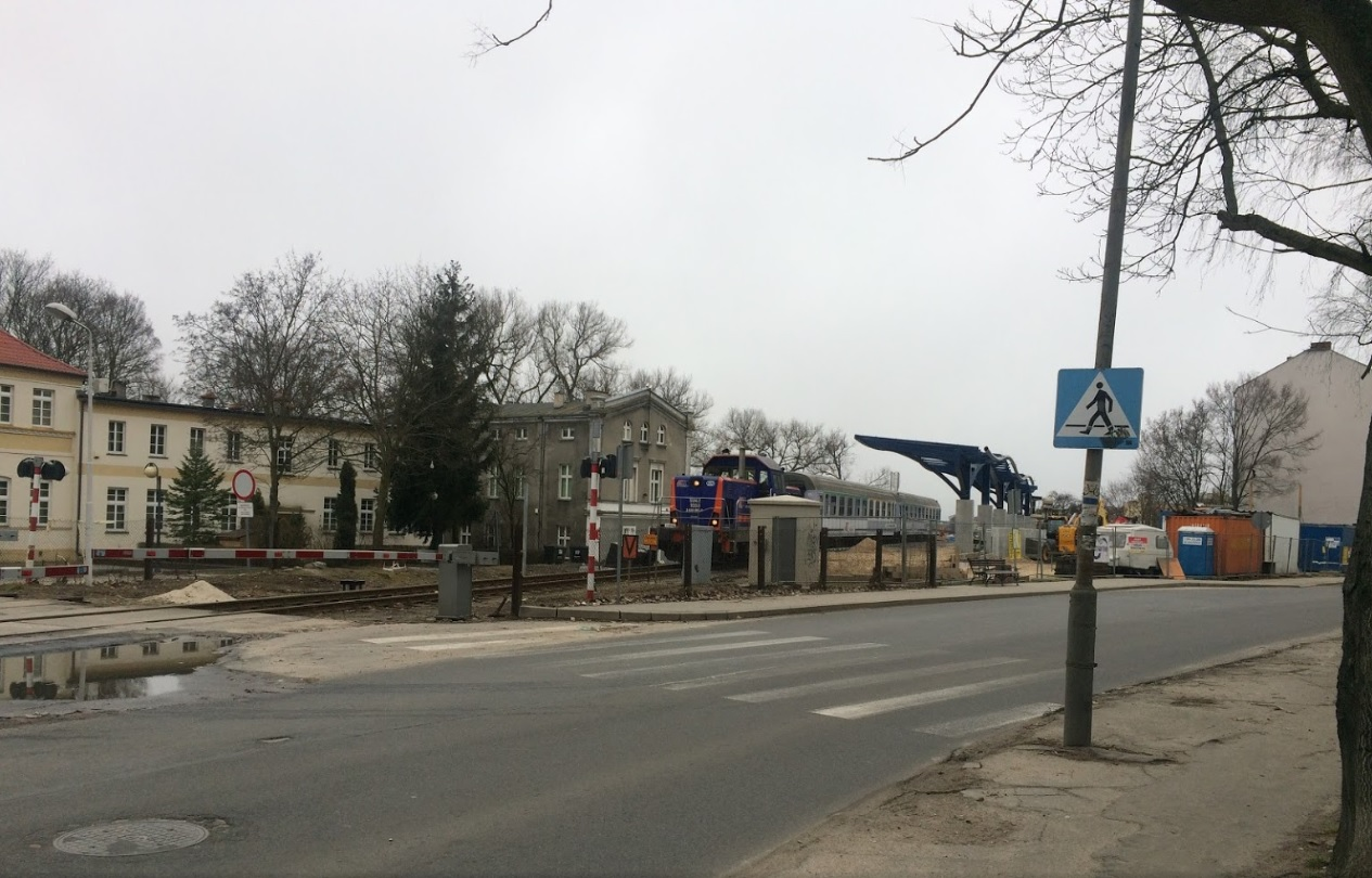 Budowa przystanku Gorzów Wielkopolski Wschodni